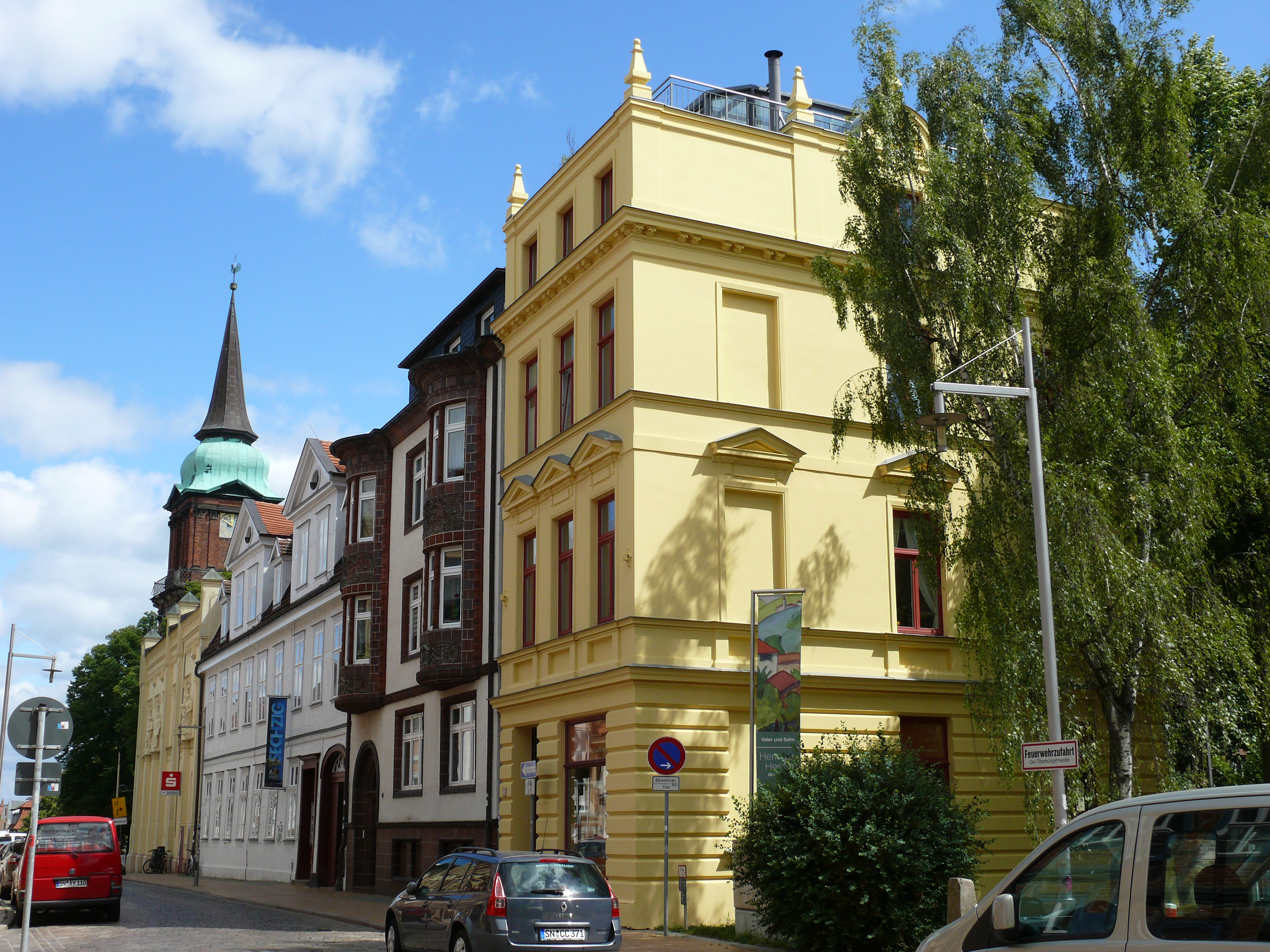 Das Gebäude "Puschkinstraße 10" in Schwerin.